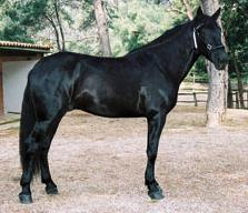 Cavall nmallorquí